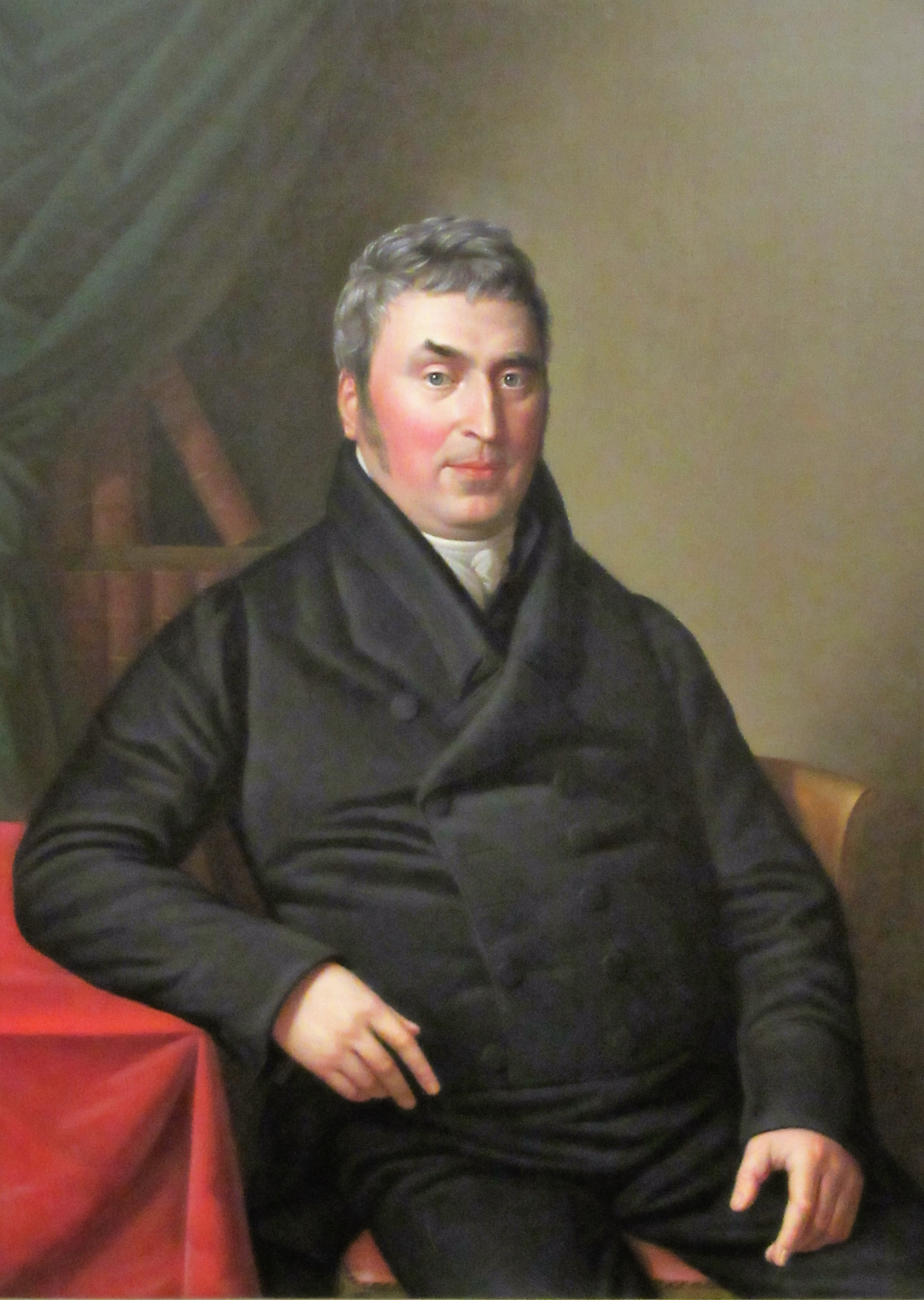 Porträt Matthias Ludwig Leithoff von Rudolph Suhrlandt, 1827 Ö/Lw. 110 x 80 cm Bez. u. r. R. Suhrlandt/1827 Inv. Nr. G. 354; MKK Lübeck